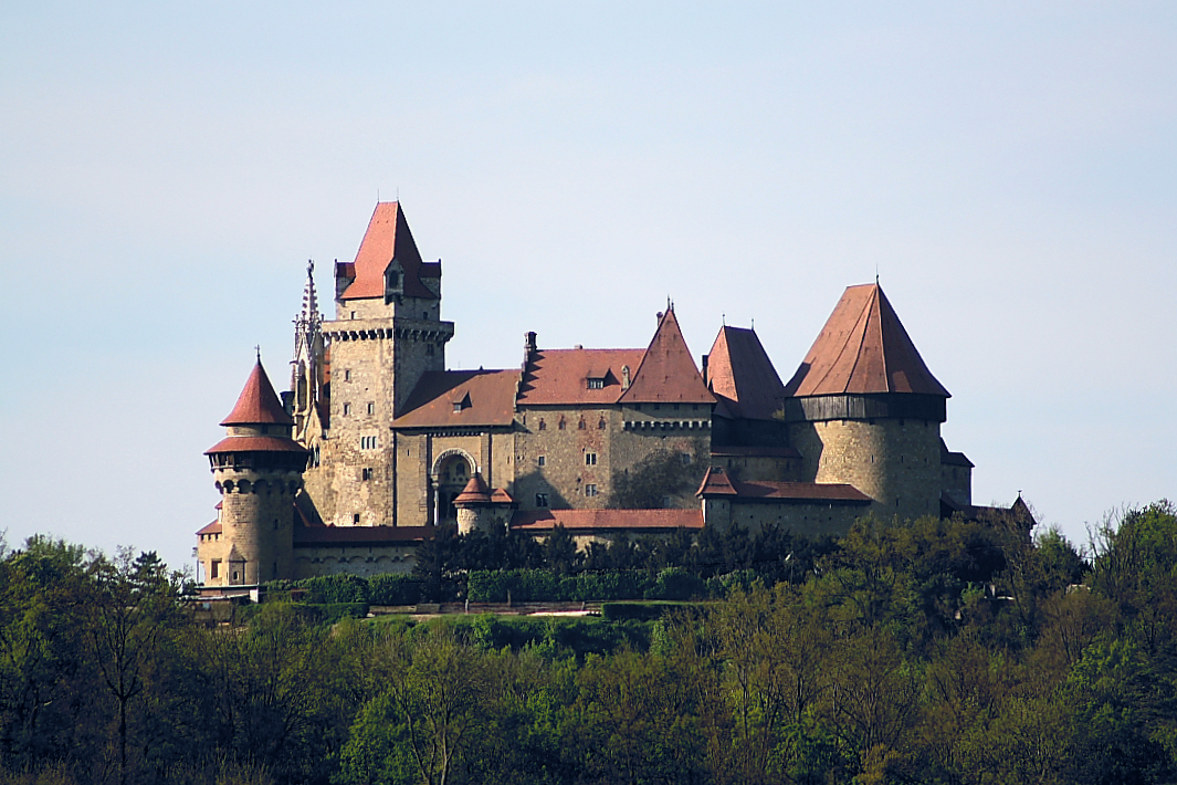 Fernansicht der Burg Kreuzenstein von Süden.Die ursprüngliche Burg wurde im Zuge des 30-jährigen Krieges zerstört und anschließend als Baumaterial großteils abgetragen. Unter Graf Johann Nepomuk Wilczek erfolgte von 1874 bis 1906 ein Wiederaufbau der Burg als Museum für seine umfangreichen Kunstsammlungen. Die so entstandene Schauburg ist heute, ergänzt durch zahlreiche wiederverwendete mittelalterliche Bauteile und nach teilweiser Beseitigung der Brandschäden von 1915 und der Kriegsschäden von 1945, ein beliebtes Tourismusziel nördlich von Wien.